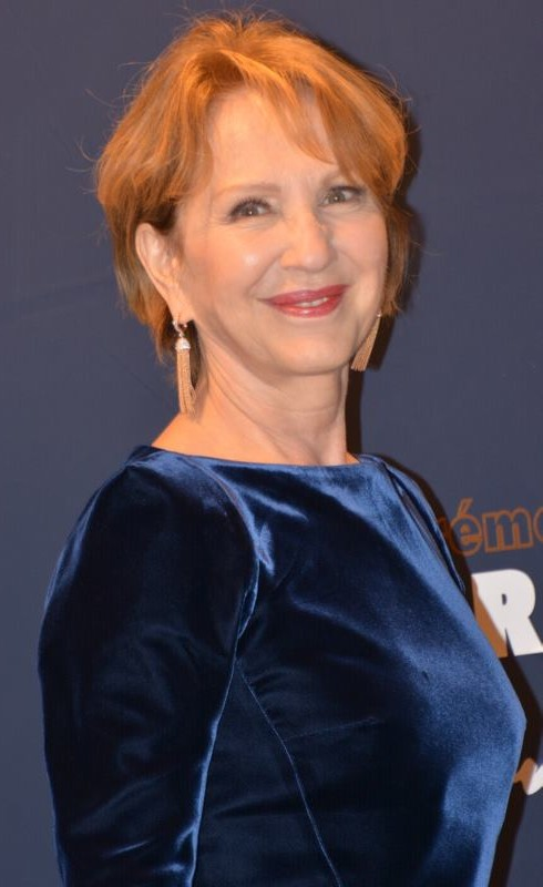 Nathalie Baye à la cérémonie des César